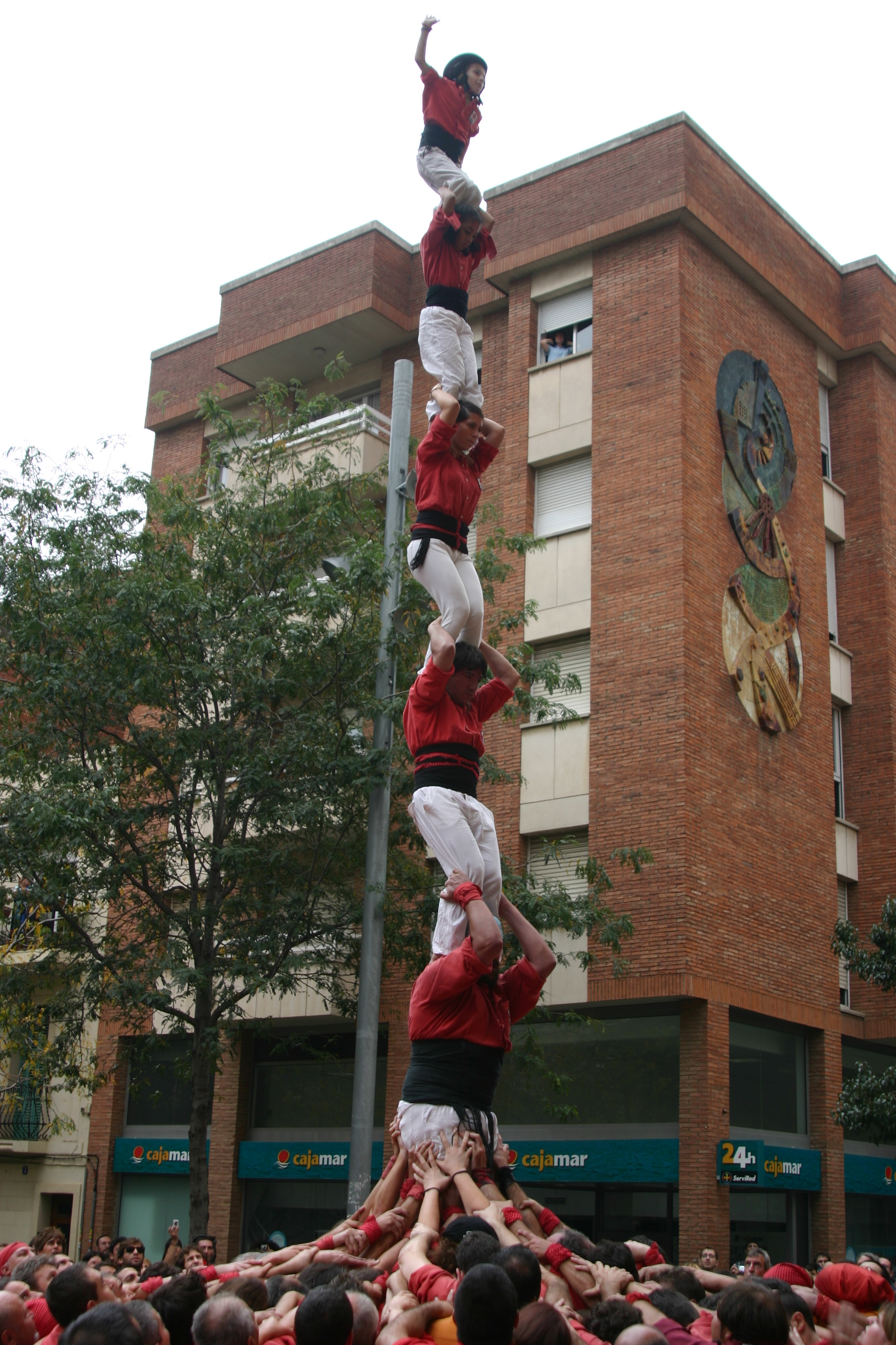 Pilar de 6 carregat pels Castellers de Barcelona a la plaça Comas, a la Festa Major de Les Corts, Barcelona.